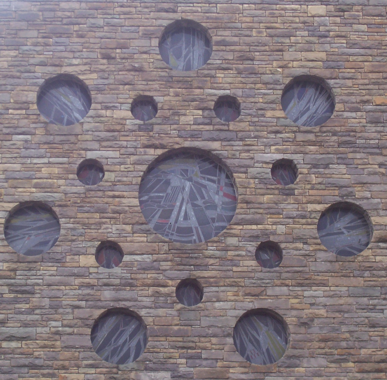 In der Giebelwand über dem Eingang von St. Konrad (Bergisch Gladbach) befindet sich diese Fensterrosette.